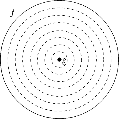 Beispiel für Homotpie: Kreis auf Punkt